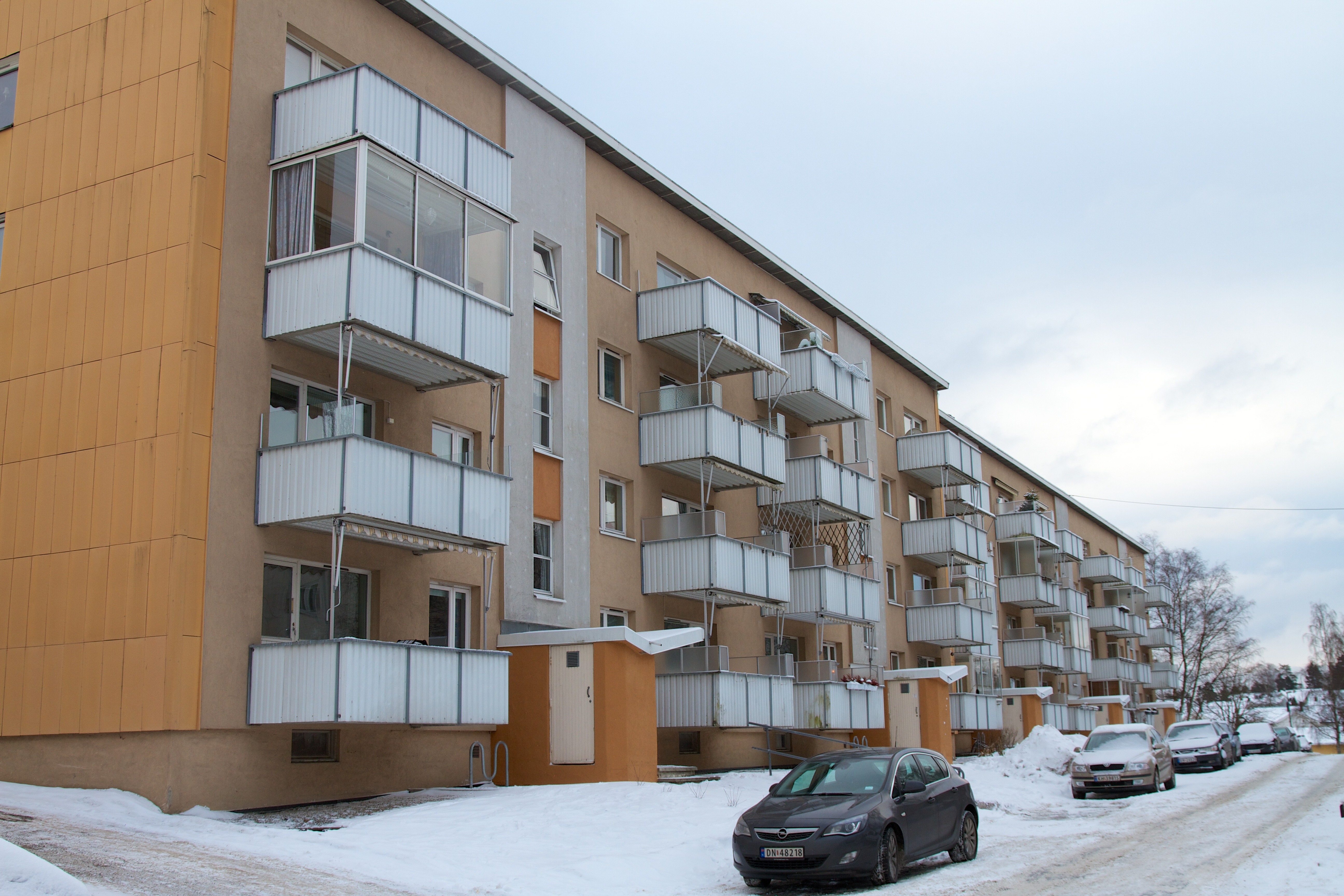 Fra Bratlikollen Boligsameie